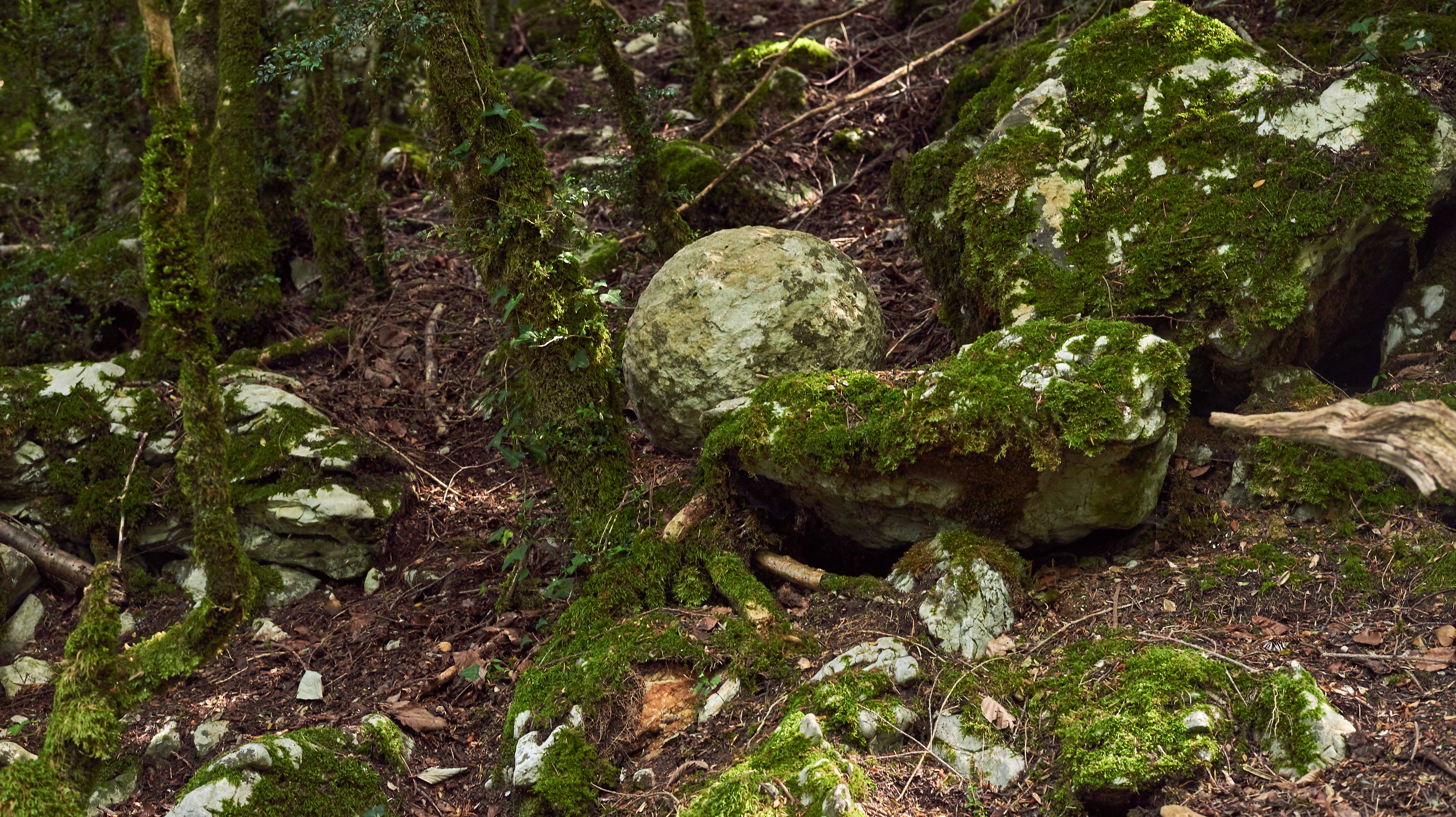 Projectil del setge de Montsegur (1244)